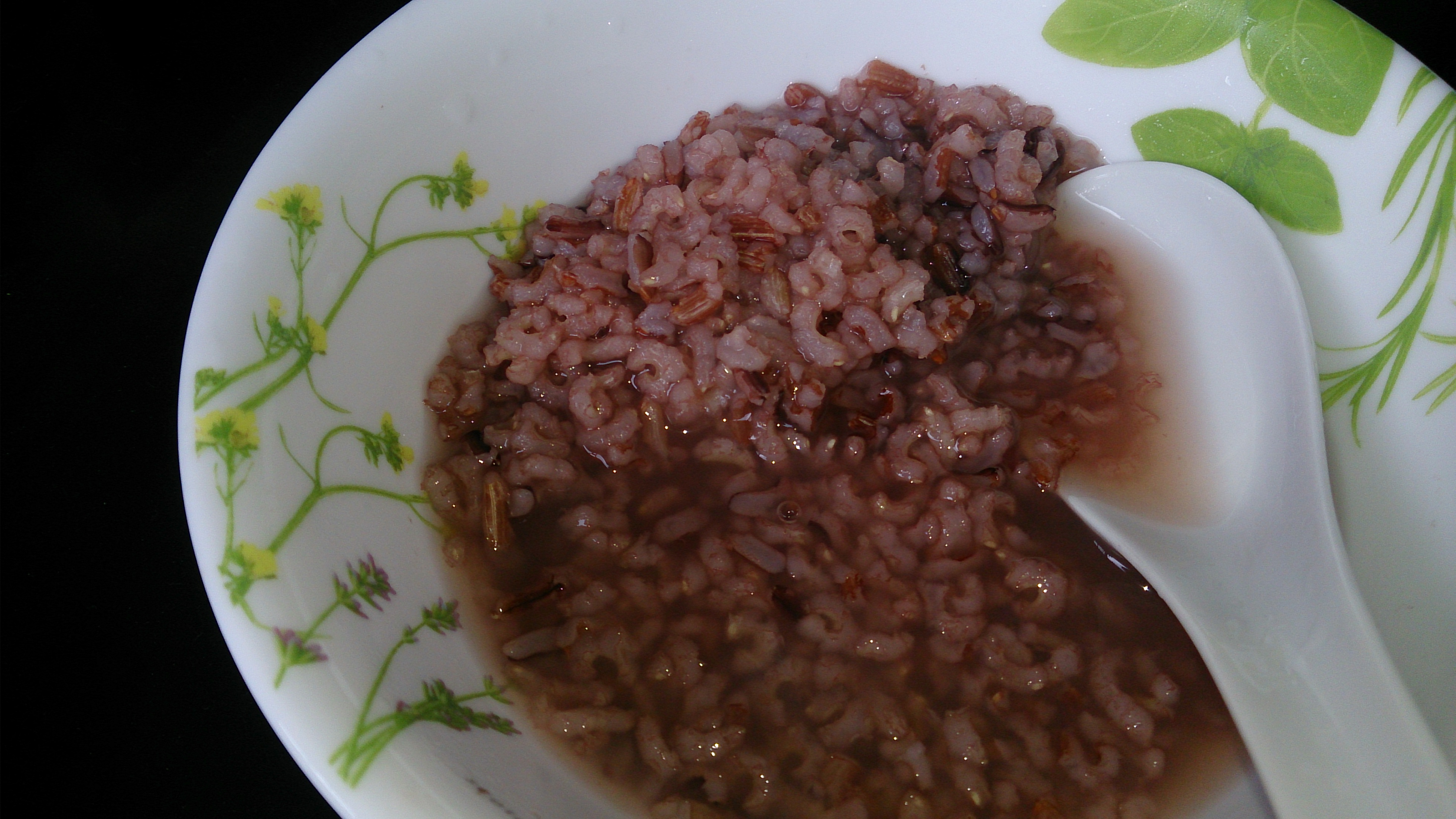 delicious